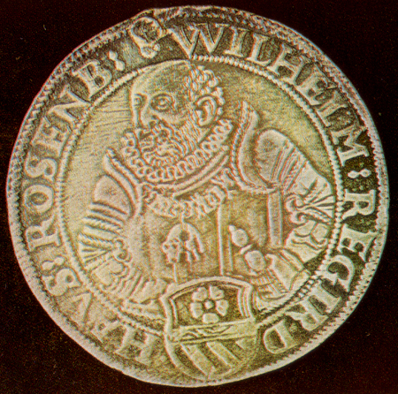 Wilhelm von Rosenberg